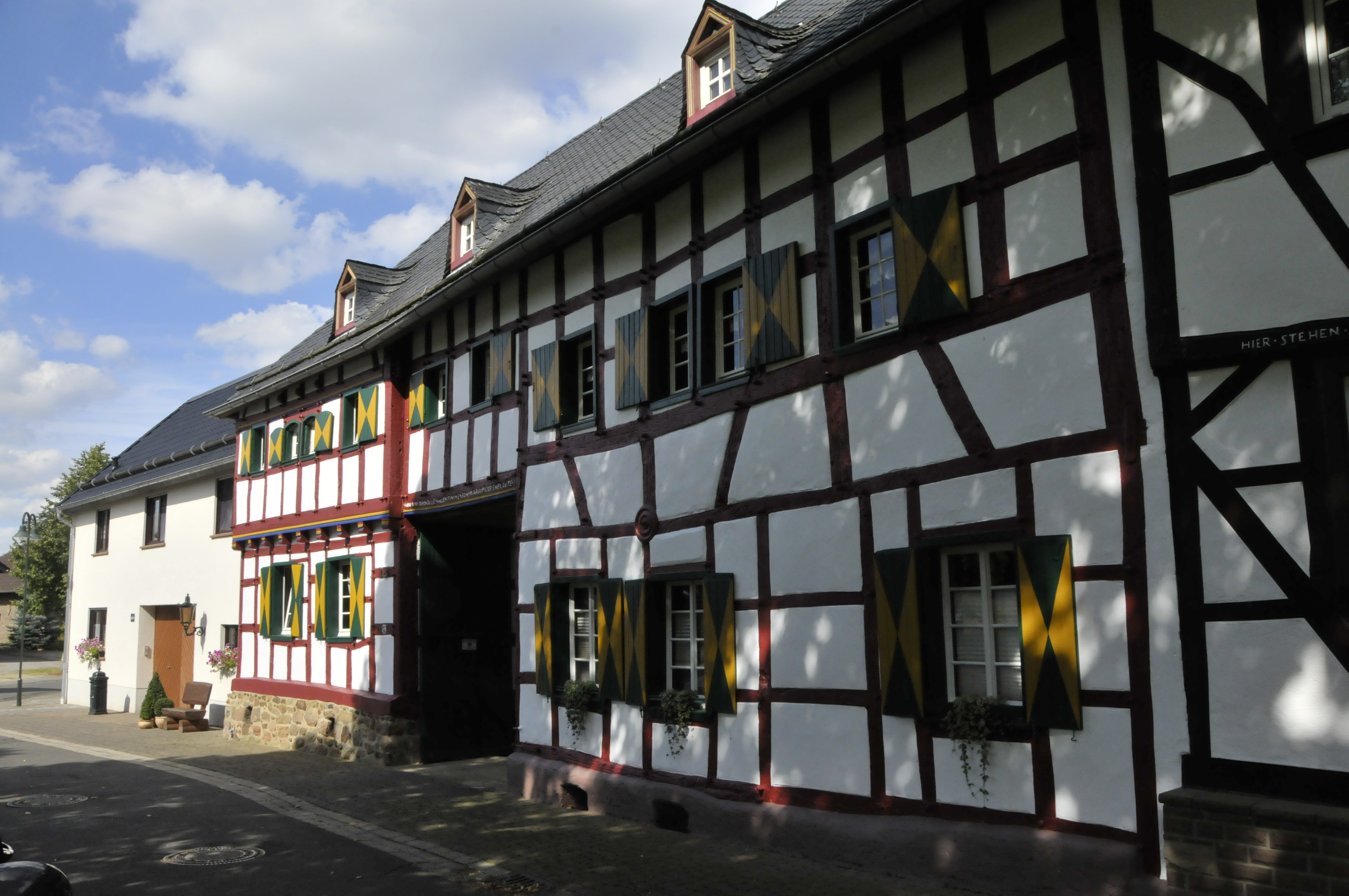 Merzkirche-Hostel